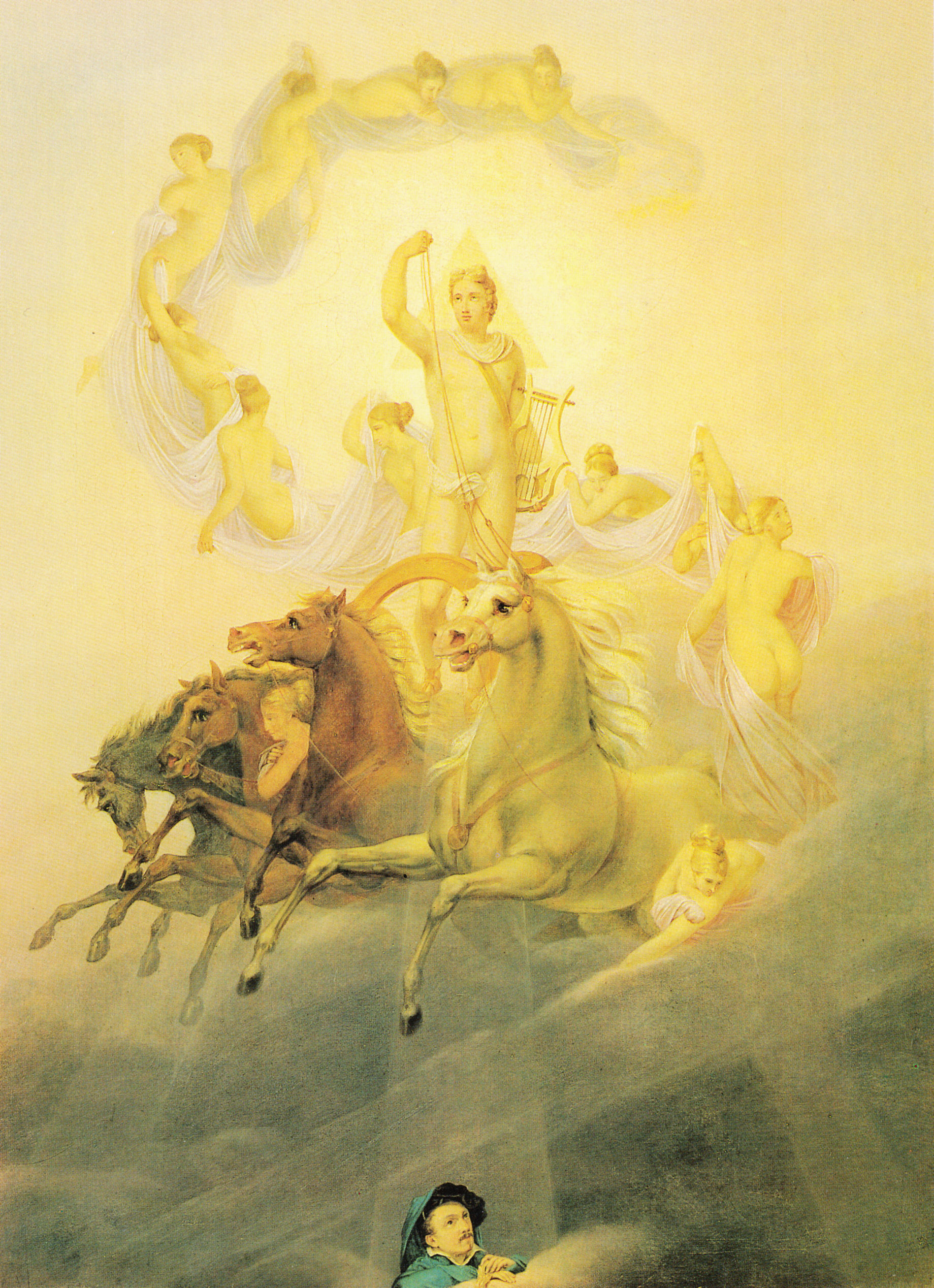 Kersting war Mitglied der Freimaurerloge Phoebus Appollo in Güstrow. Am unteren Bildrand hat er sich selbst abgebildet, aufblickend zu Apoll, von dem ein Lichtstrahl auf ihn herniederfällt.